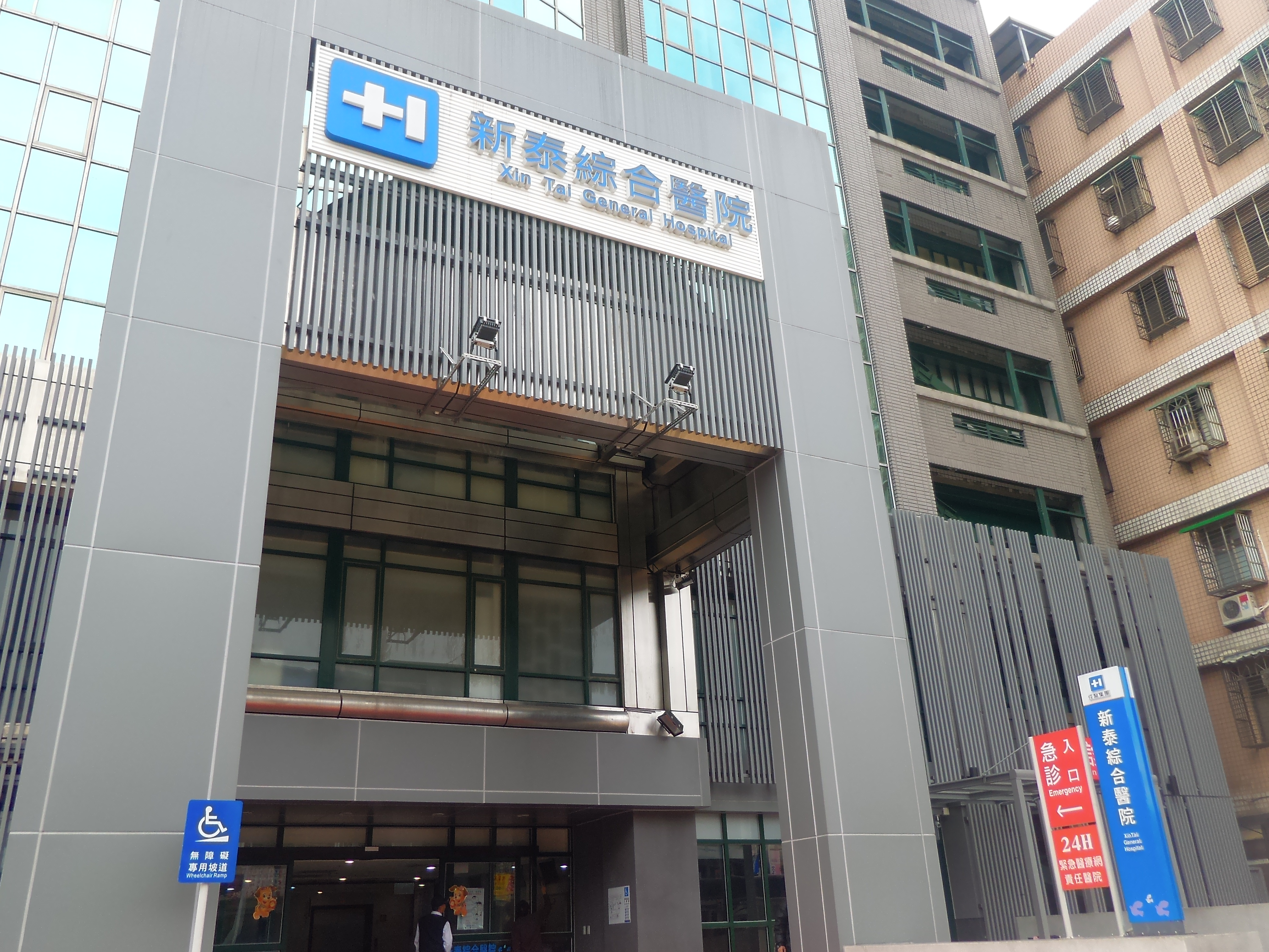 中文（台灣）: 新莊新泰醫院新址